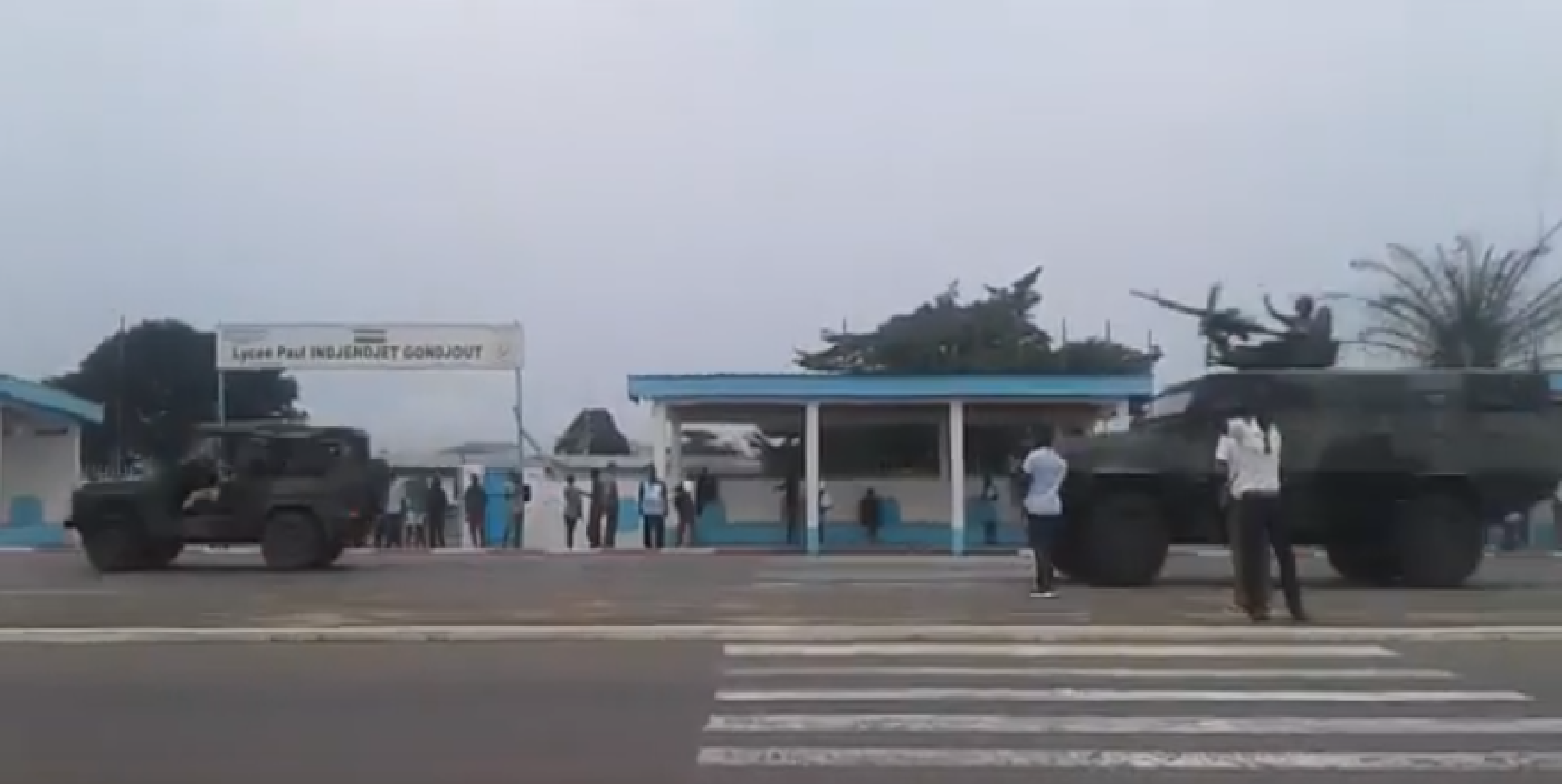 Ejército de Gabón en las calles de Libreville durante el intento de golpe de Estado de 2019.